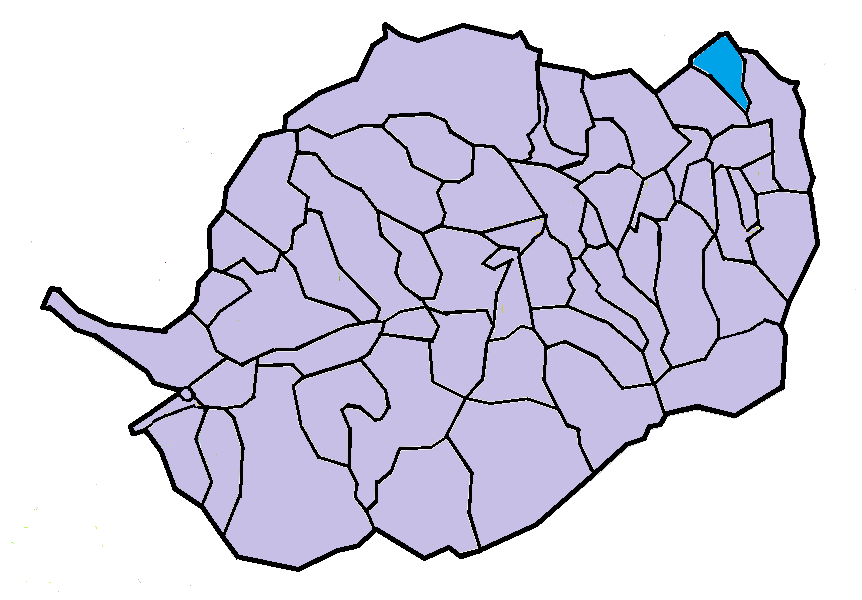 Tarerac en el Conflent, a partir del mapa municipal del Conflent de lliure disposició adaptat al Nomenclàtor toponímic aprovat el 2007